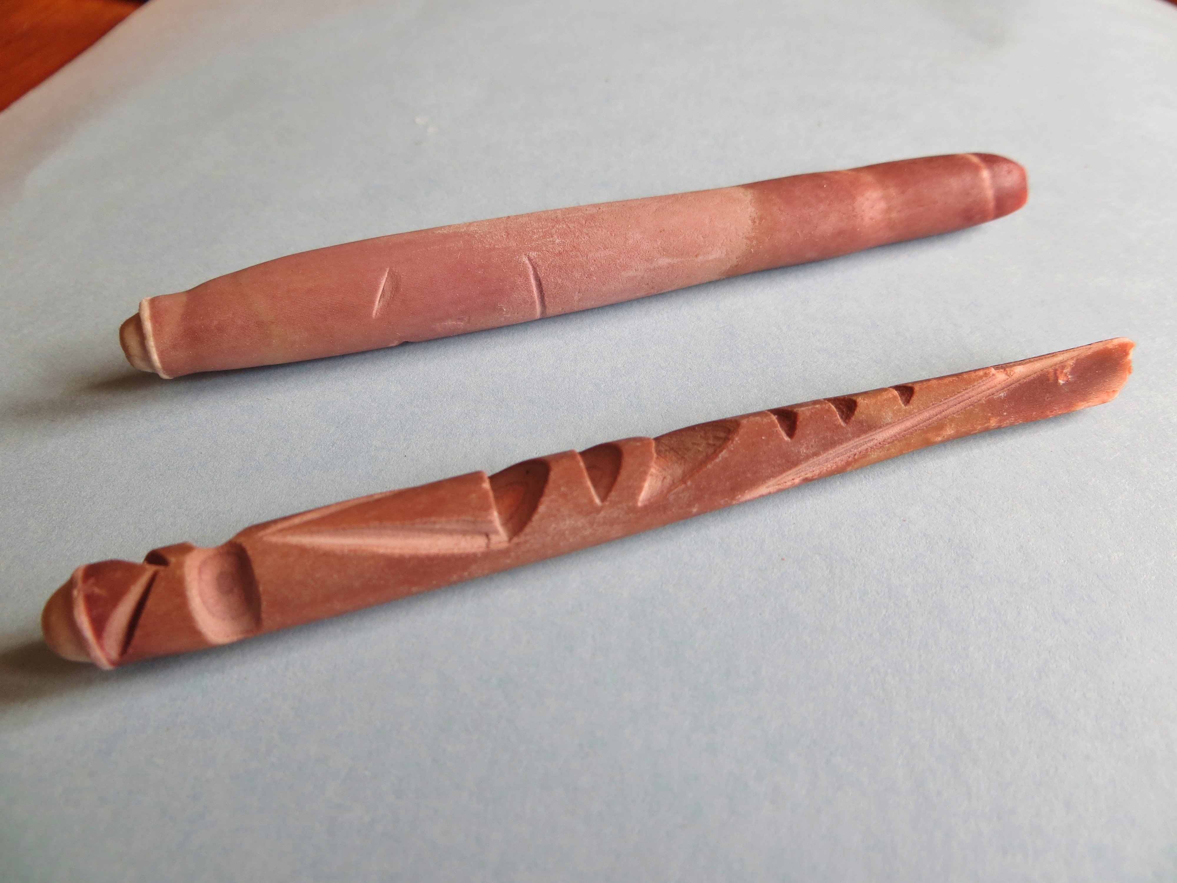 Radioles sculptées d'Heterocentrotus mamillatus